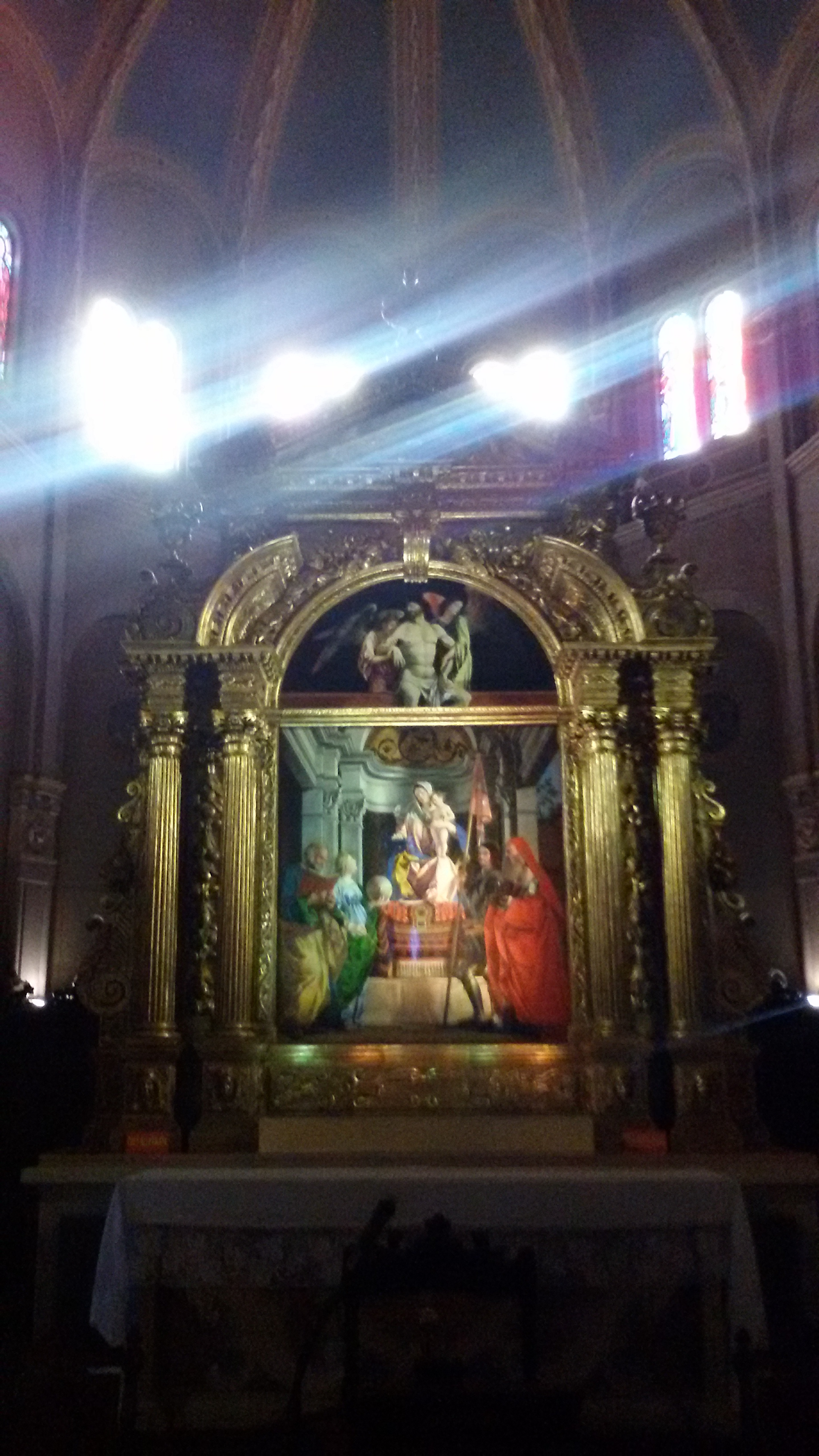 Chiesa di Santa Cristina Quinto di Treviso